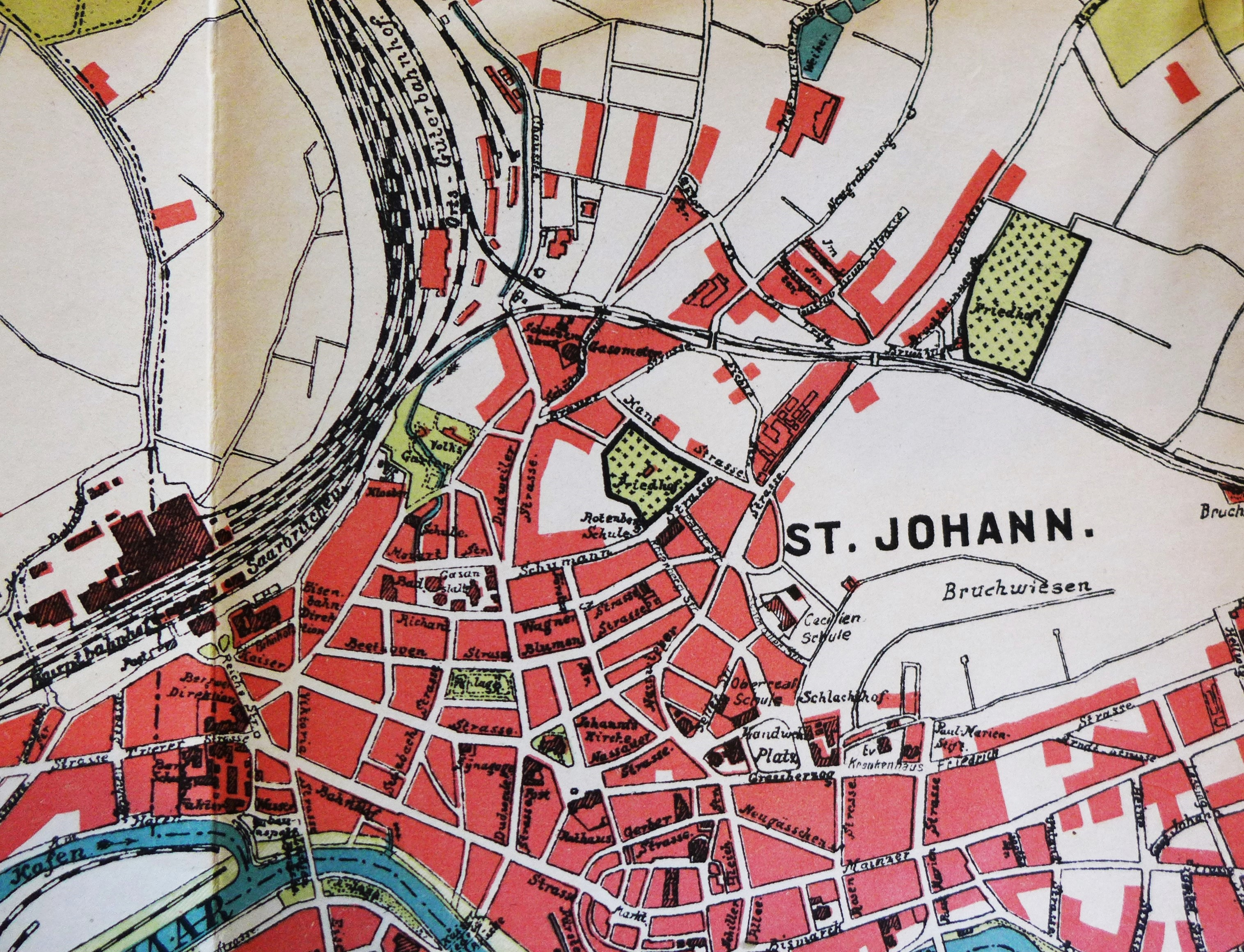 Der Rotenbergfriedhof (Bildmitte) in St. Johann zu Beginn des 20. Jahrhunderts (Albert Ruppersberg: Geschichte der ehemaligen Grafschaft Saarbrücken, 4 Bände, Saarbrücken 1908–1914, Band 4, Übersichtskarte.)